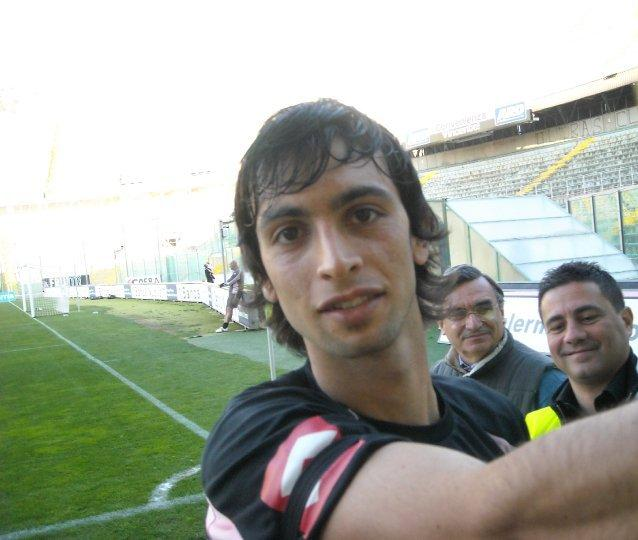 Foto Javier Pastore.